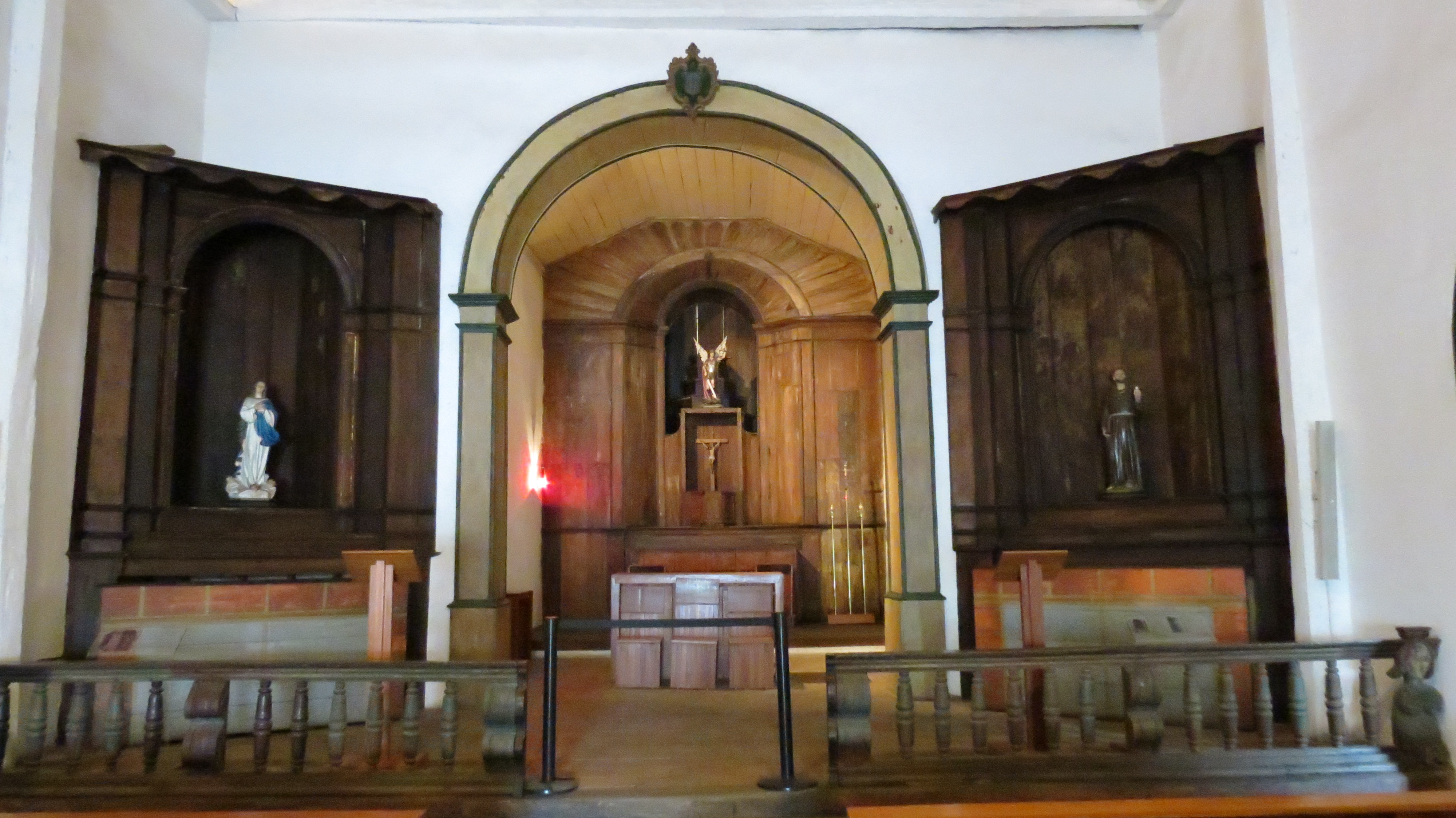 Detalhe do altar principal da capela